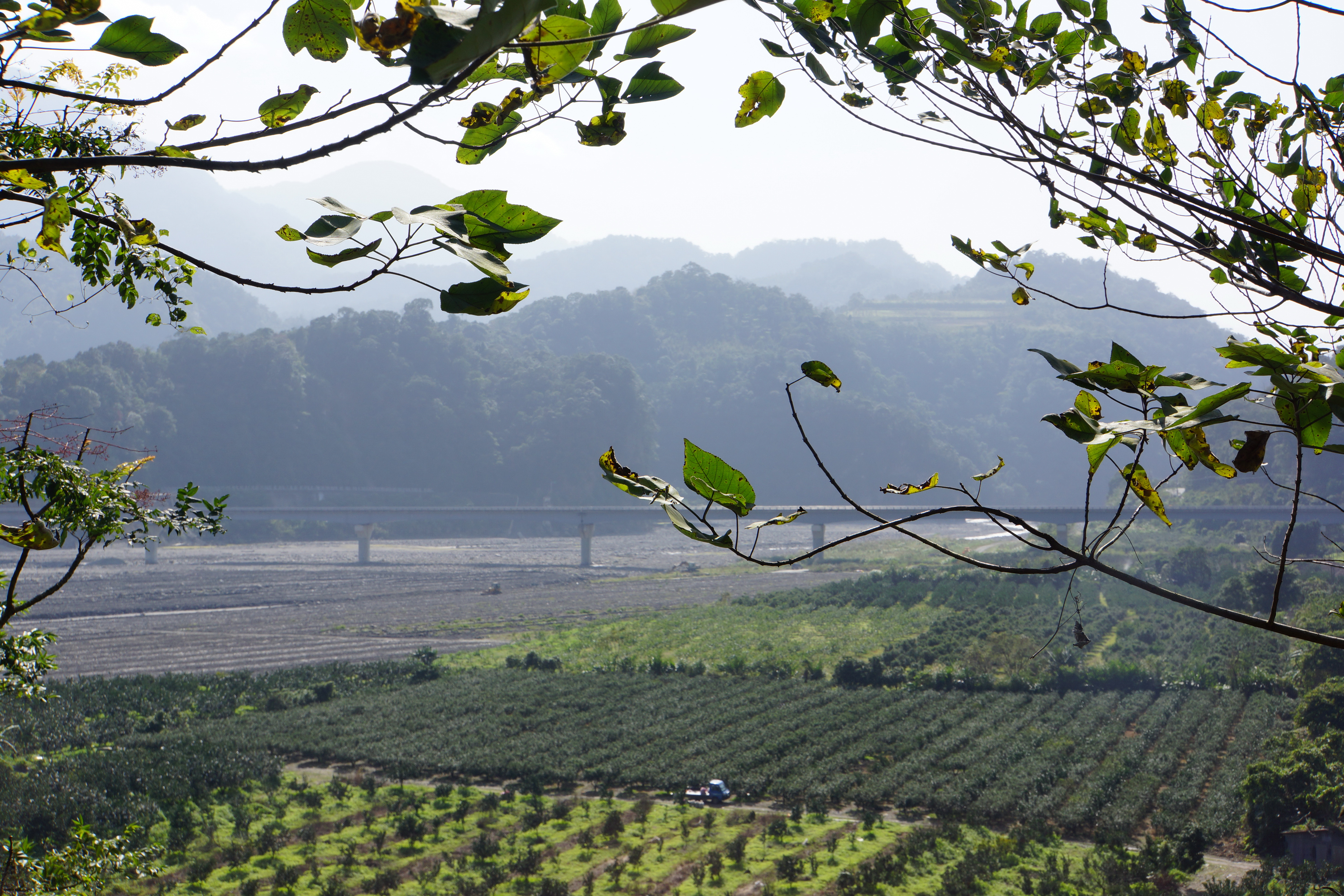 蘭陽溪牛鬥橋 Niudou Bridge over Langyang River